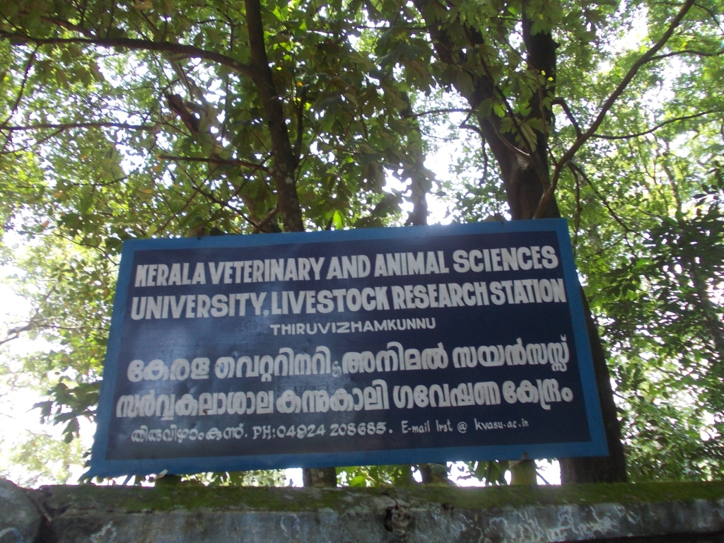 കന്നുകാലി ഗവേഷണകേന്ദ്രം, തിരുവിഴാംകുന്ന്